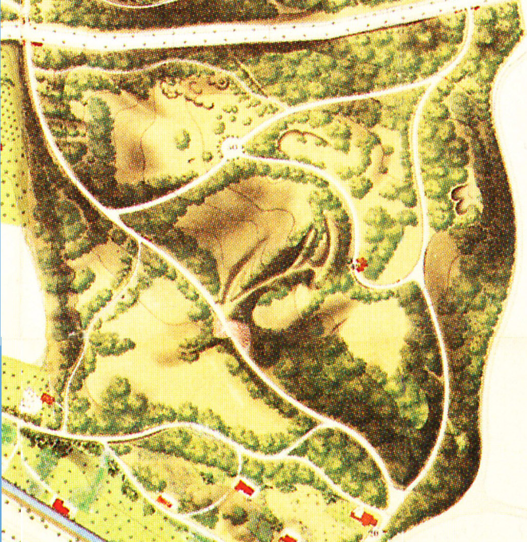 Kraatzplan 1862, Ausschnitt Böttcherberg